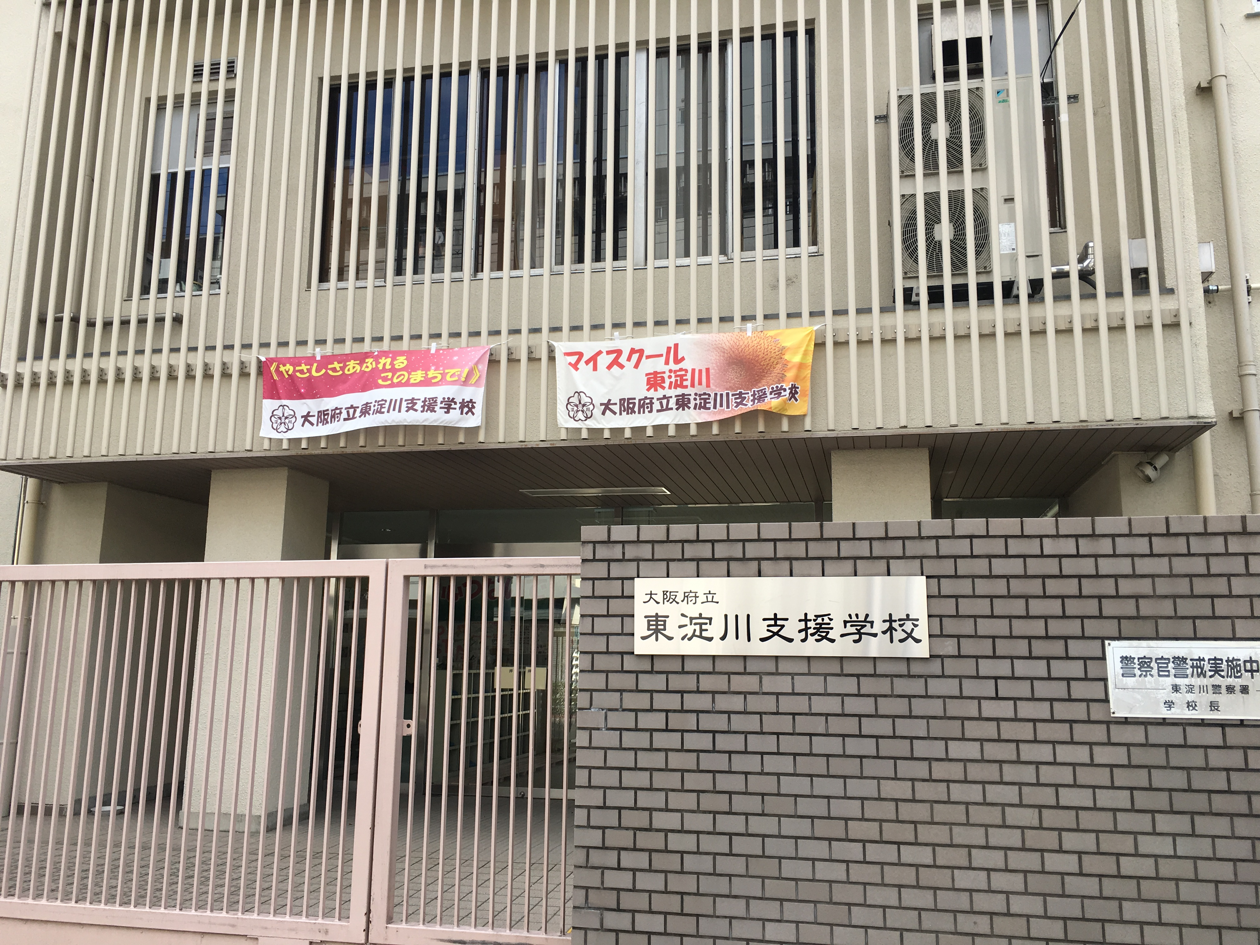 大阪府立東淀川支援学校